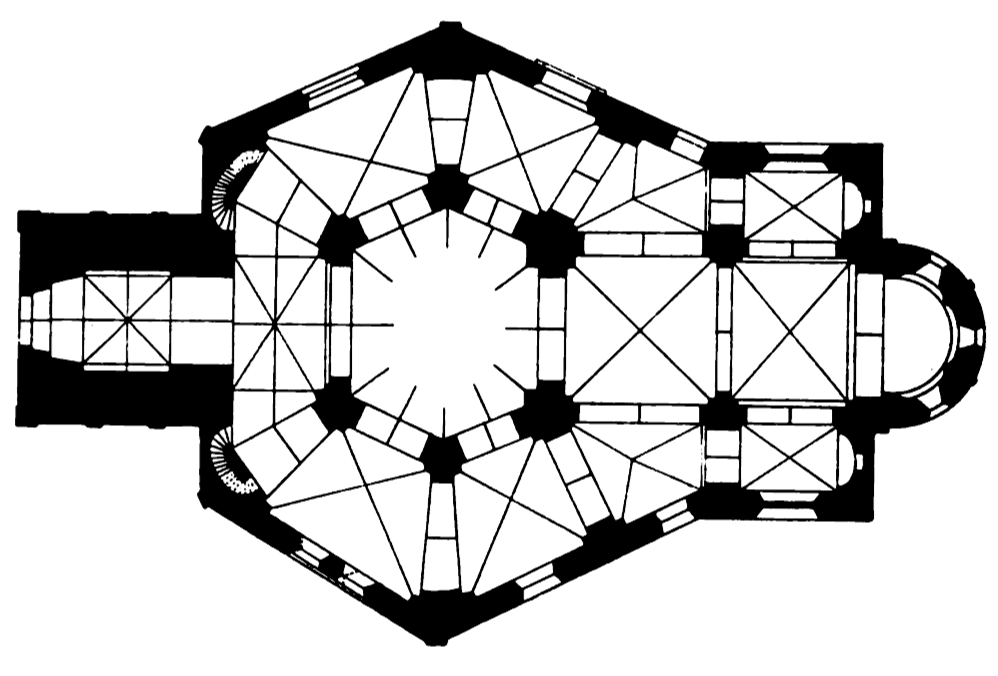 Nikolaikirche in Siegen/Westfalen: Grundriss. Zeichnung von Albert Ludorff, 1903